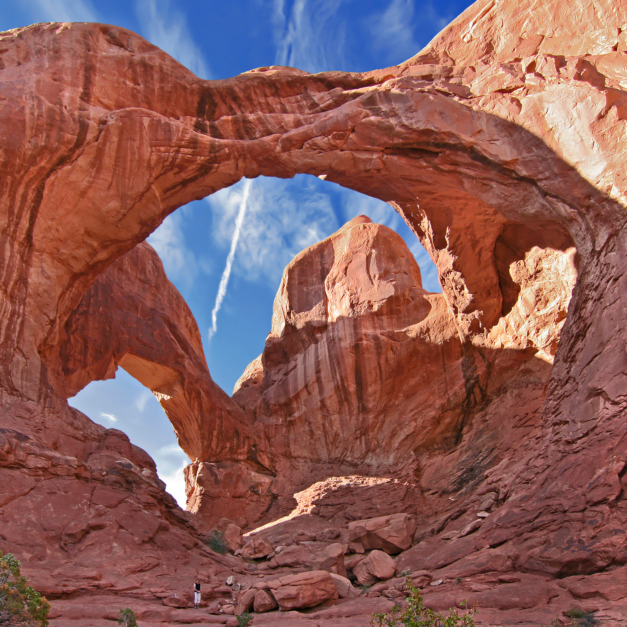 Double Arch im Arches Nationalpark, Utah, USA